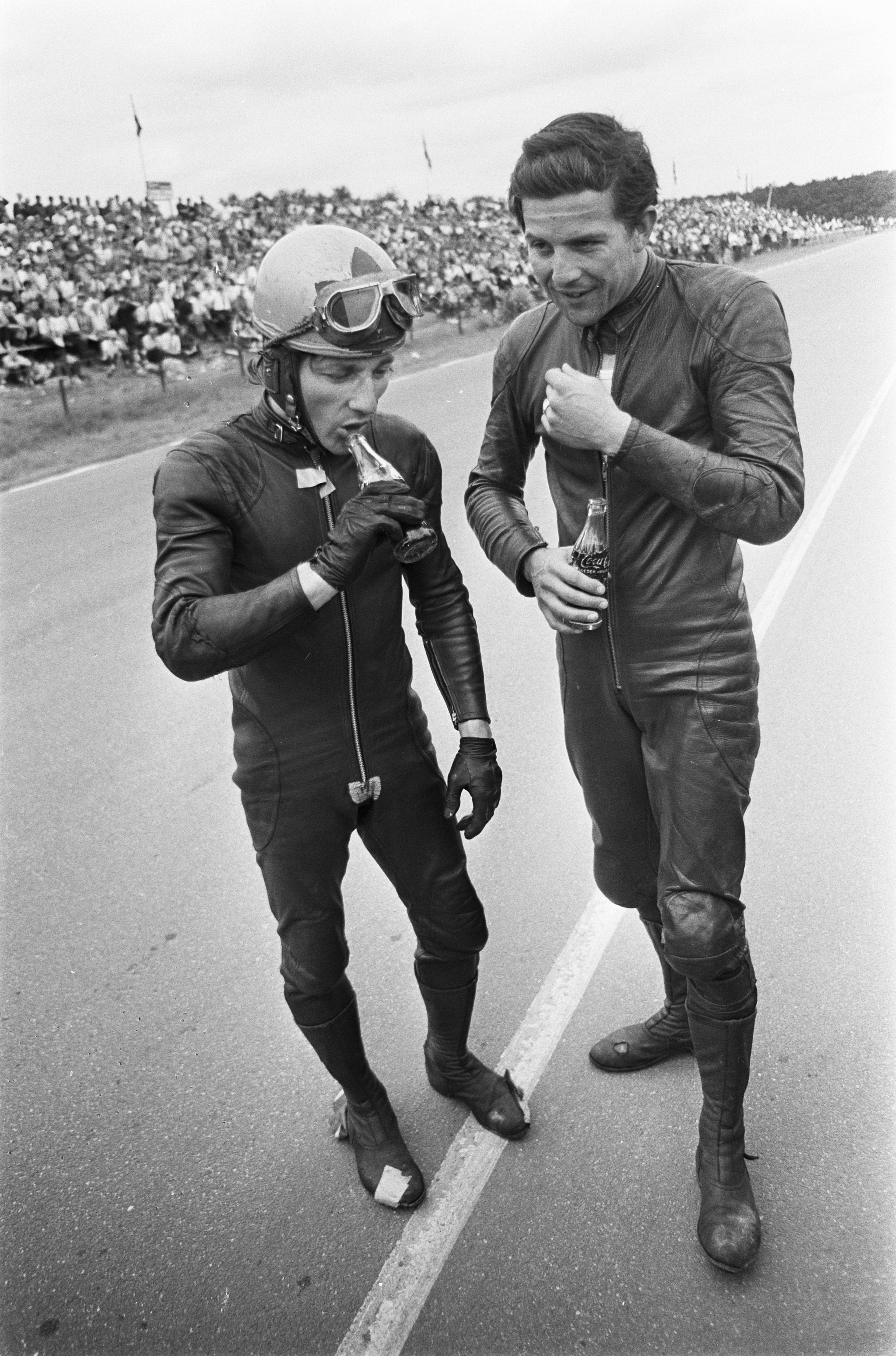 Collectie / Archief : Fotocollectie Anefo Reportage / Serie : [ onbekend ] Beschrijving : TT Assen. Nummer 4 Bill Ivy en Phil Read (rechts) na de race 250cc Datum : 2 juli 1968 Locatie : Assen Trefwoorden : motorraces , sport Persoonsnaam : Ivy Bill, Read, Phil Fotograaf : Nijs, Jac. de / Anefo Auteursrechthebbende : Nationaal Archief Materiaalsoort : Negatief (zwart/wit) Nummer archiefinventaris : bekijk toegang 2.24.01.05 Bestanddeelnummer : 921-4823